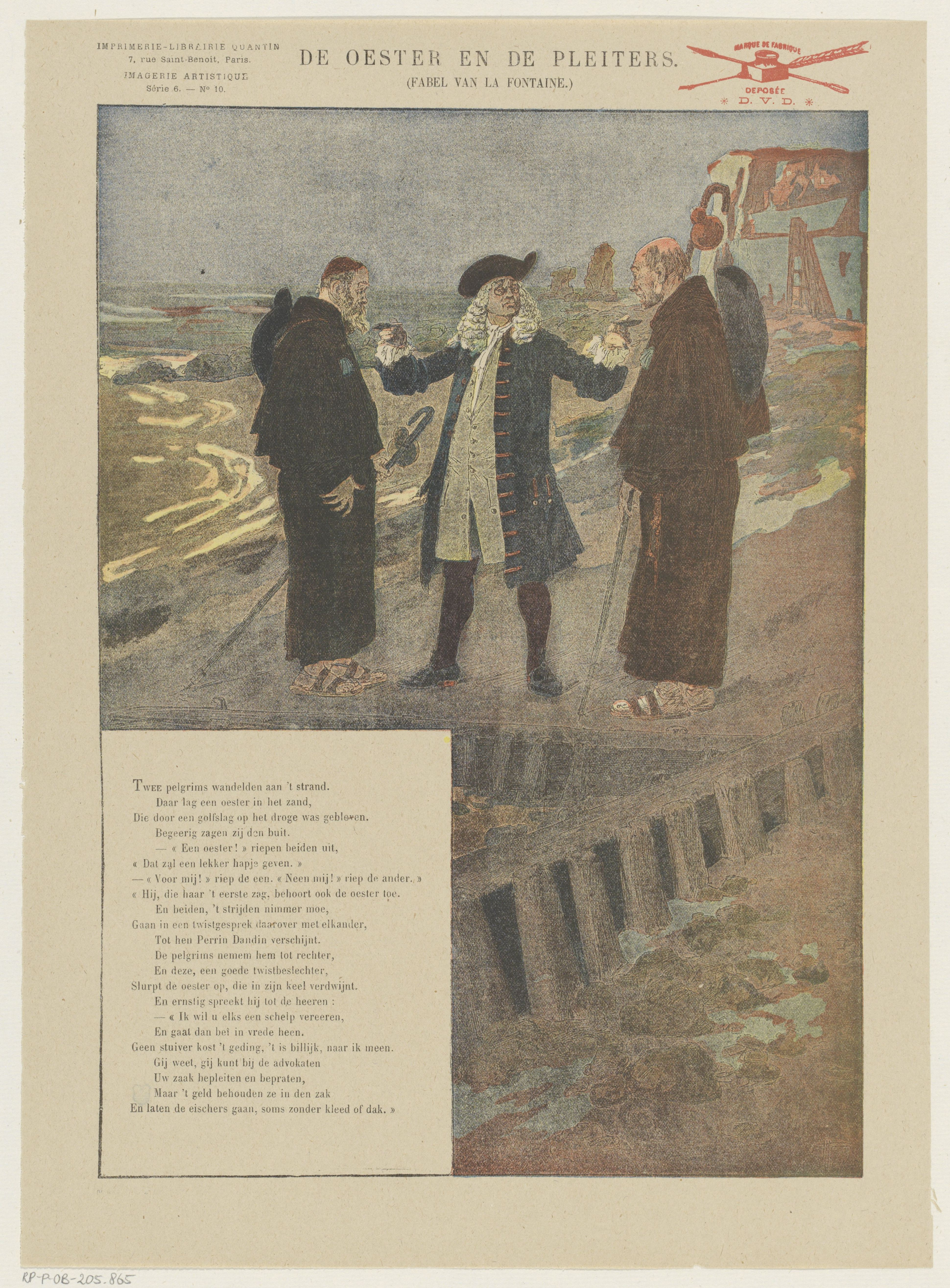 IdentificatieTitel(s): De oester en de pleiters (titel op object)Fabel van La Fontaine (serietitel op object)Imagerie Artistique / Série 6 (serietitel op object)Objecttype: prent volksprent Serienummer: 10/20Objectnummer: RP-P-OB-205.865Opschriften / Merken: verzamelaarsmerk, verso, gestempeld: Lugt 2760octrooivermelding, recto rechtsboven, gestempeld: ‘marque de fabrique / deposée / * D.V.D. *’, rode stempel met inktpot, pen en schrijfveerOmschrijving: Blad met een grote voorstelling uit de fabel van Jean de La Fontaine, van de oester en de pleiters. Linksonder een tekstblok met een vers. Genummerd linksboven: Série 6. - No. 10.VervaardigingVervaardiger: ontwerper: Hermann Vogel (vermeld op object)prentmaker: anoniemuitgever: Albert Quantin (vermeld op object)Plaats vervaardiging: ParijsDatering: 1876 - 1890 en/of 1888Fysieke kenmerken: kleurenlithografie en tekst in boekdrukMateriaal: papier Techniek: kleurenlithografie (procedé) / boekdrukAfmetingen: blad: h 365 mm × b 267 mmOnderwerpWat: fabelsmolluscs: oysterpilgrim(s)Verwerving en rechtenCredit line: Schenking van de heer F.G. Waller, AmsterdamVerwerving: schenking 1923Copyright: Publiek domein